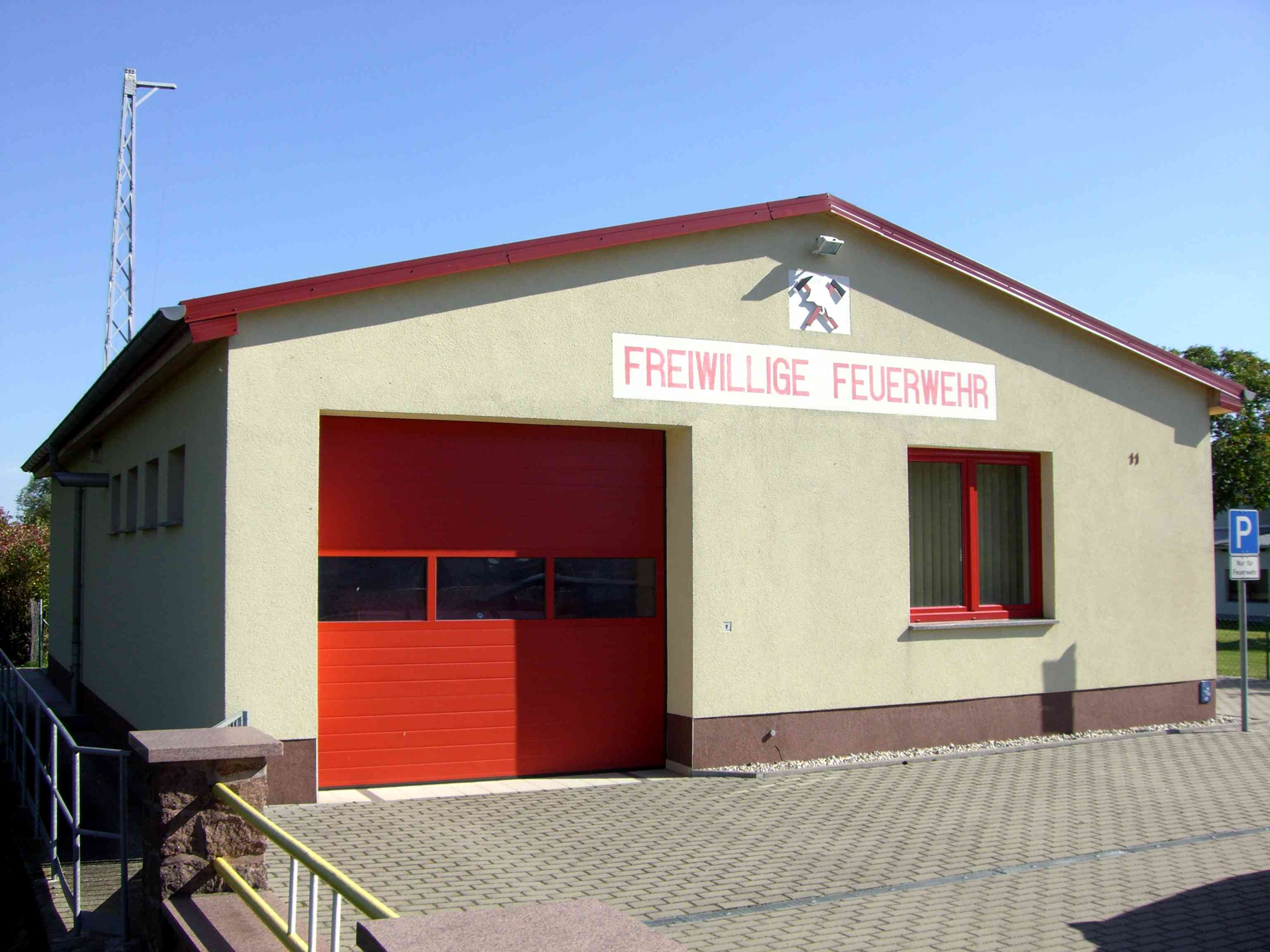 Reichenhain